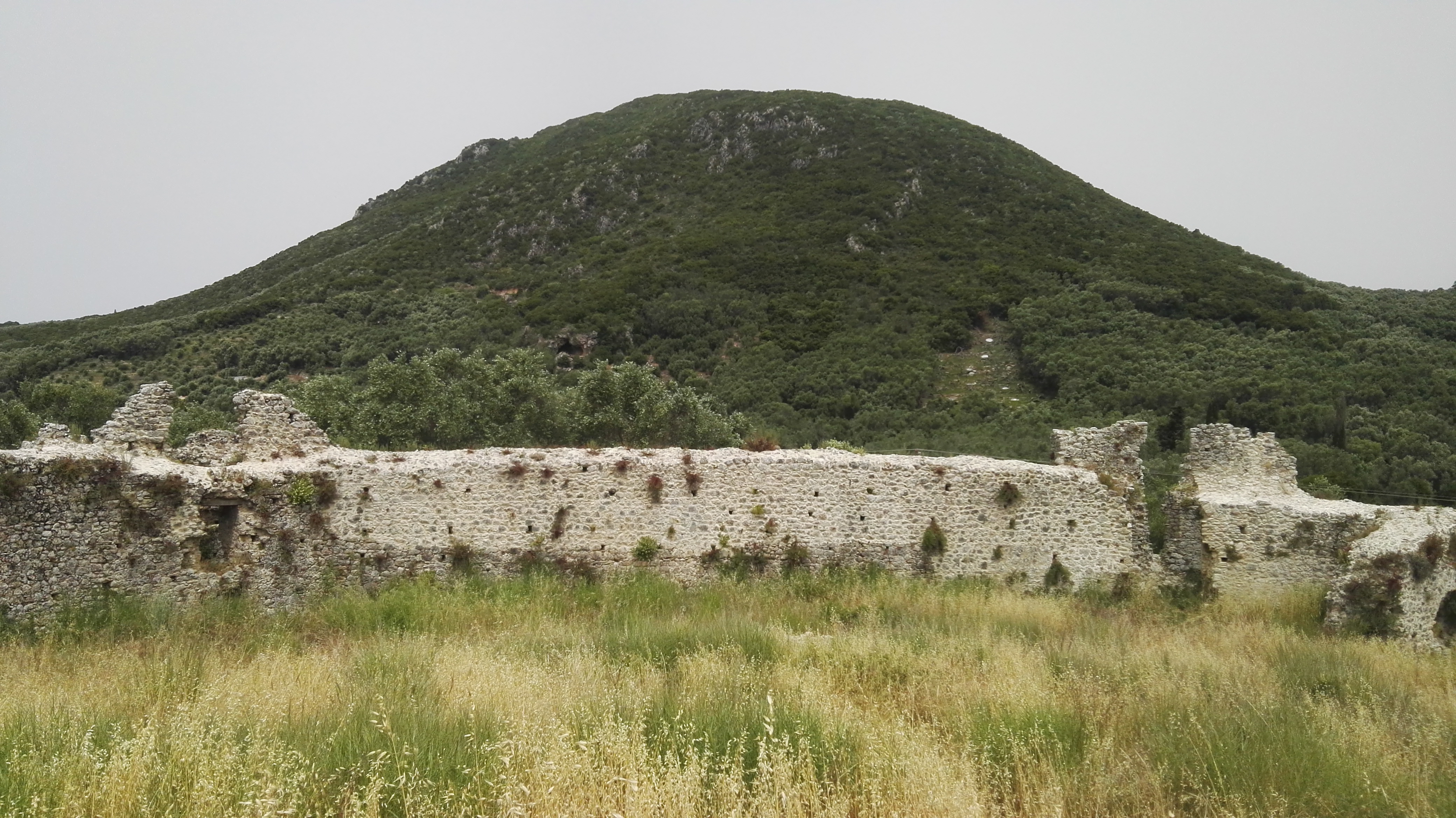 Mauerreste der byzantinischen Festung in Gardiki auf Korfu